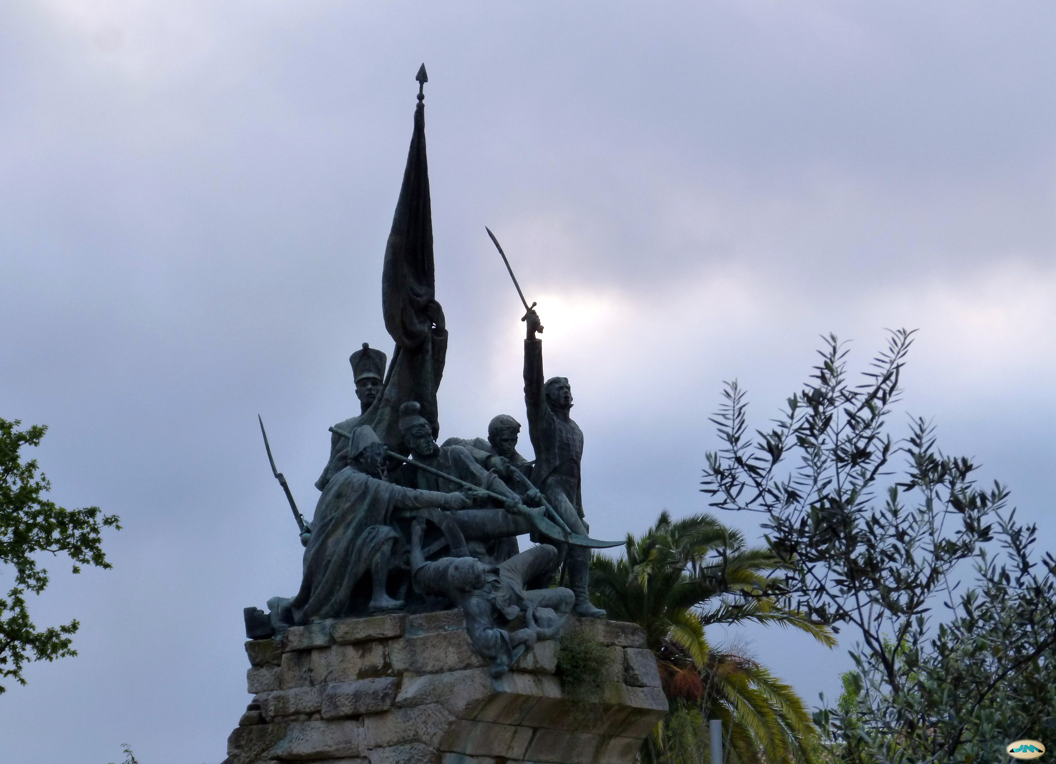 Con un cielo lleno de nubes, para un martes como hoy.